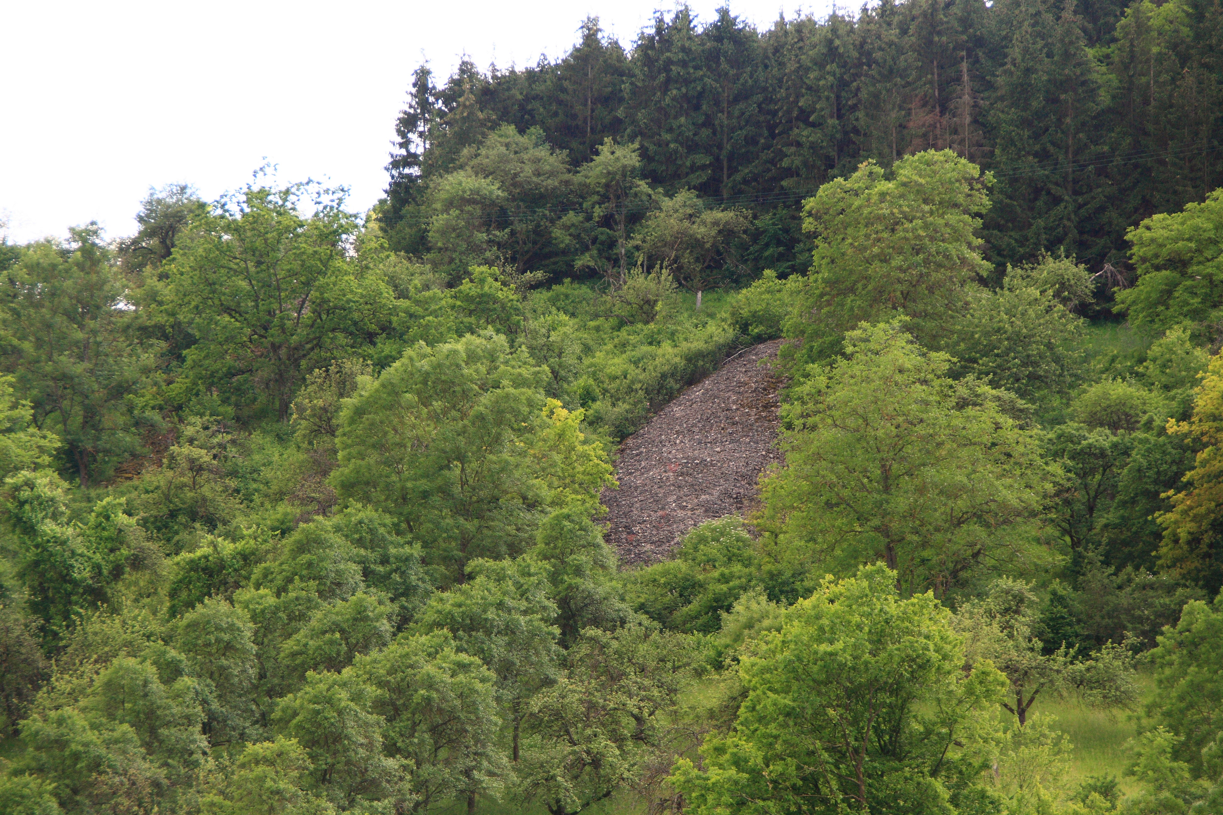 Unbewachsener Steinriegel am Winterberg in Weikersheim.